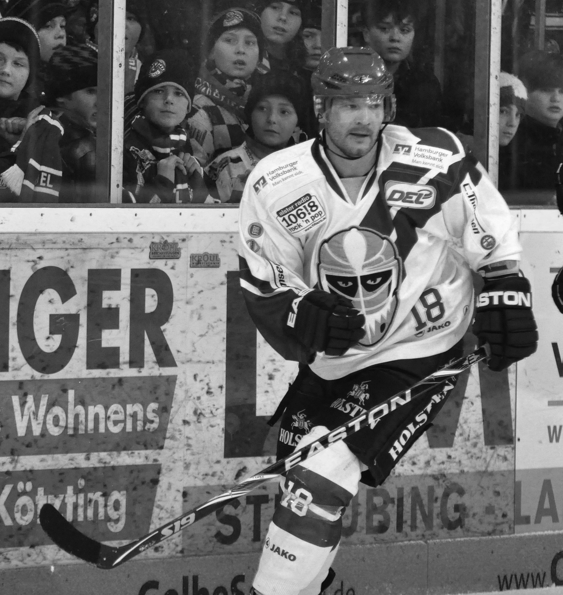 Straubing Tigers - Hamburg Freezers 26.02.2012 DEL Deutsche Eishockey Liga